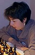 Ekaterina Borulya, Schachbundesliga der Frauen Saison 1998/99, 7. Runde (Krefelder Schachklub, Brett 1).